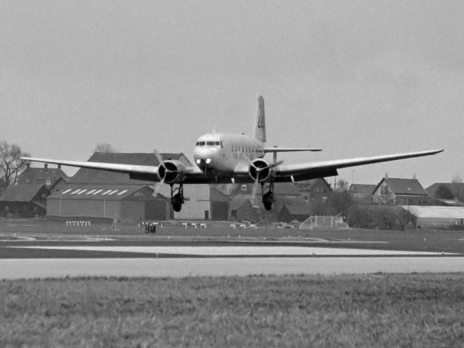 Aankomst van de Uiver op Schiphol, na motorpech in Saoudi Arabie ; aankomst Uiver (vergezeld door jongen) 31 maart 1984